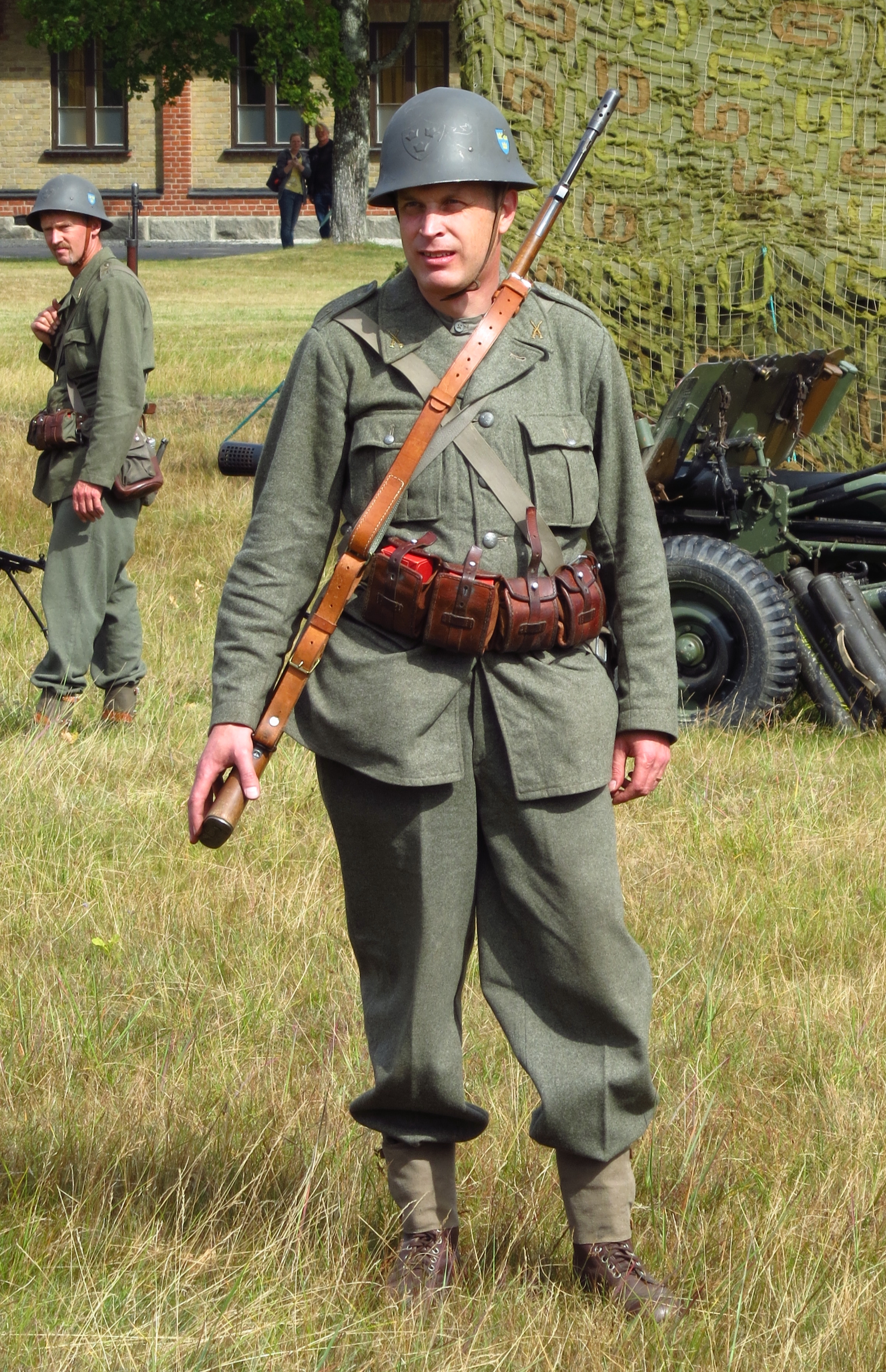 Soldat i uniform modell 1939 vid Regementets Dag på P7 Revingehed